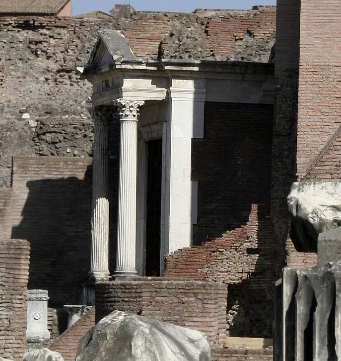 Edicule de Juturne.